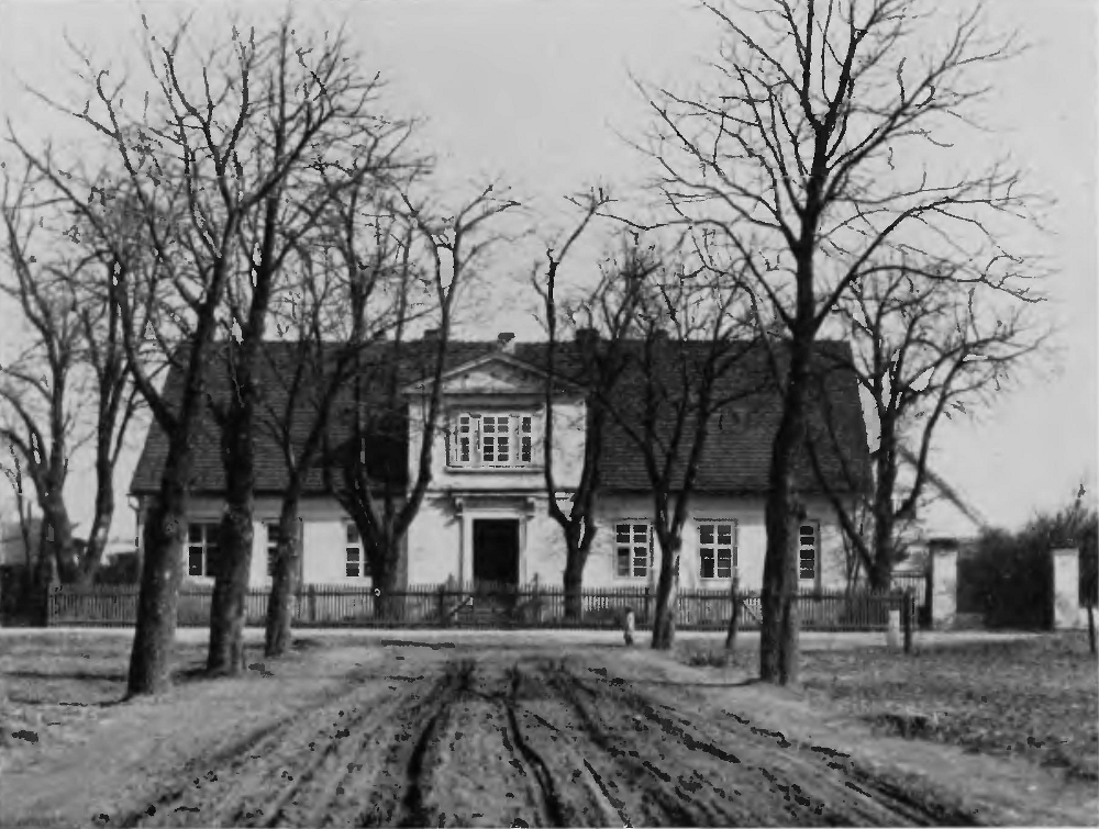 Ehemalige Oberförsterei in Brzezetz im Landkreis Cosel in Oberschlesien. Erbaut um 1840.